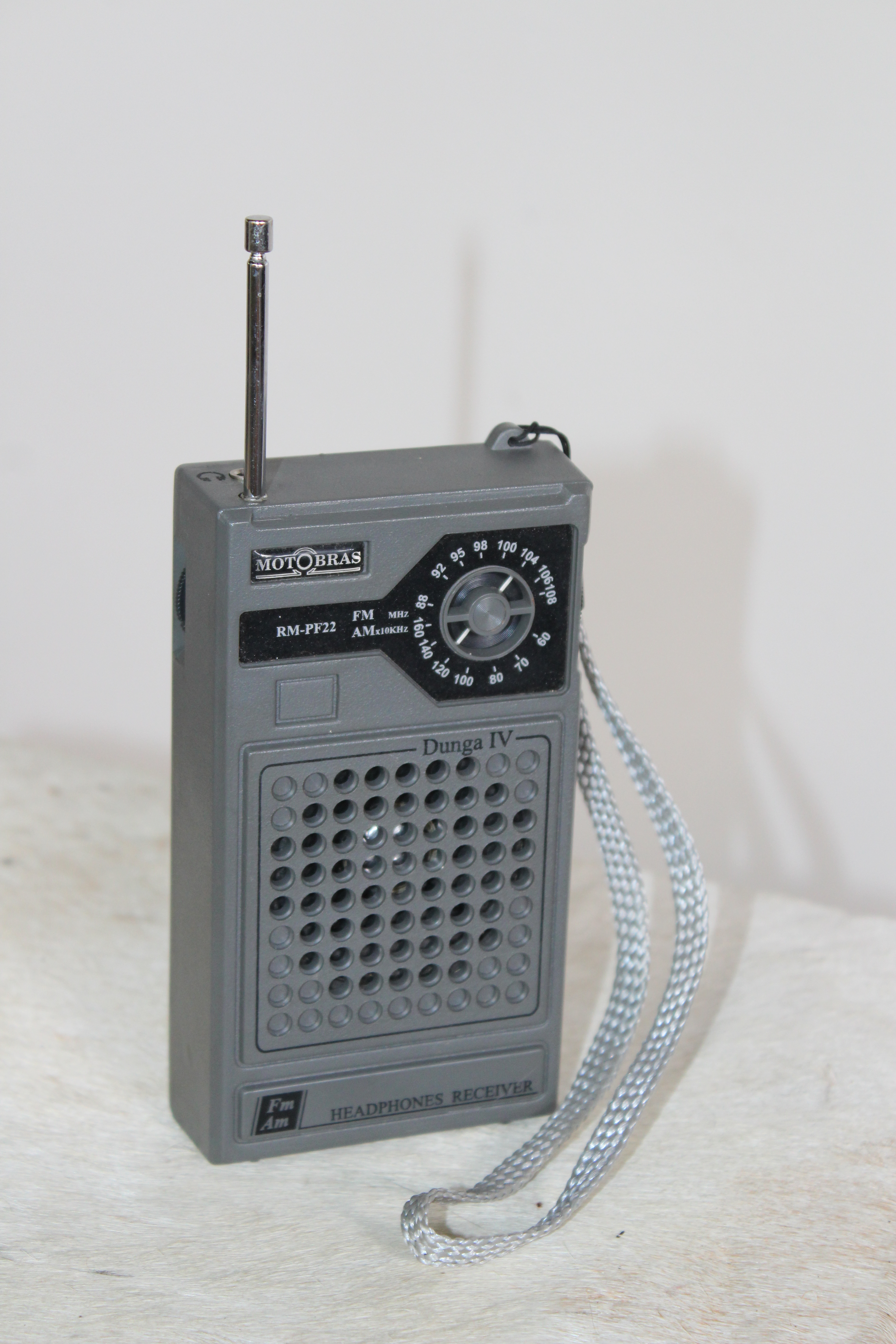 Rádio portátil, modelo Dunga IV, da marca Motobrás.